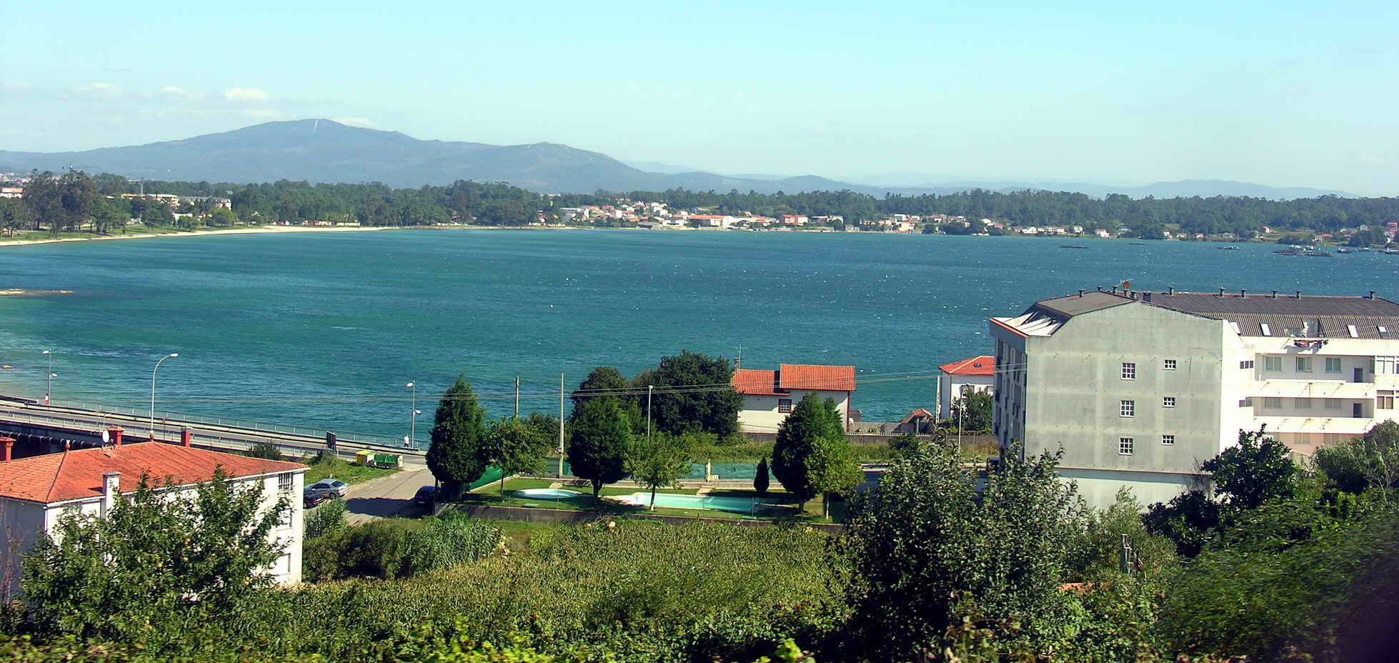 self made. Ría de Arousa - Galicia - Spain Foto tirada desde a vía rápida do Barbanza (entre Rianxo e Boiro) a 80 ou 90km por hora